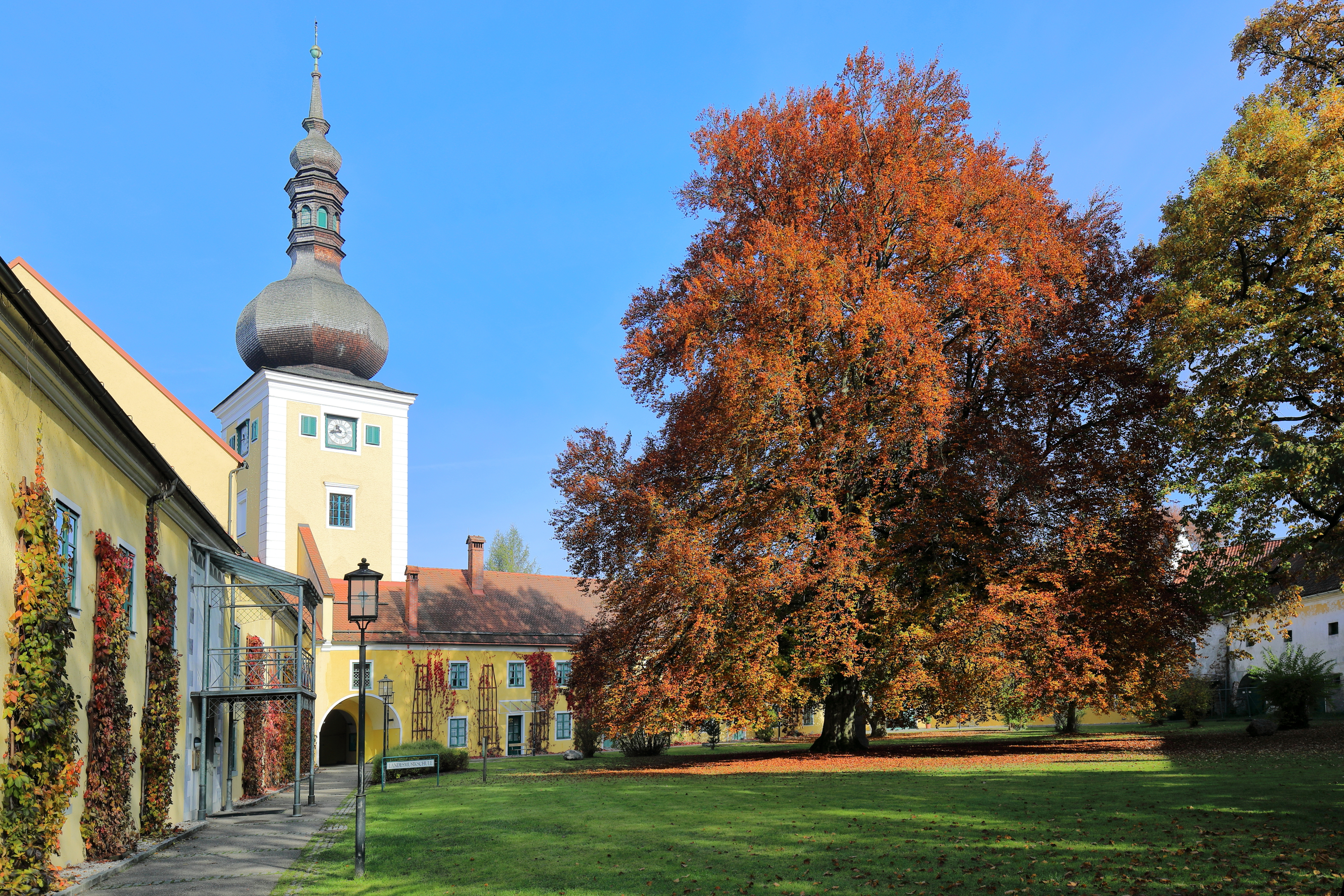 Hofinnenansicht des Vorschlosses bzw. des Wirtschaftshofes der Schlossanlage in Puchheim, ein Ortsteil der oberösterreichischen Stadtgemeinde Attnang-Puchheim.Im Zentrum des Hofes steht eine mächtige Blutbuche, die seit 1984 als Naturdenkmal geführt wird. Im Vorschloss mit dem wirkungsvollen Einfahrtsturm, das im Besitz der Stadt Attnang-Puchheim und der Diözese Linz ist, ist die Landesmusikschule, das Bildungszentrum Maximilianhaus, das Pfarrzentrum der Pfarre Maria Puchheim und die Galerie Schloss Puchheim untergebracht. This media shows the natural monument in Upper Austria with the ID nd281.